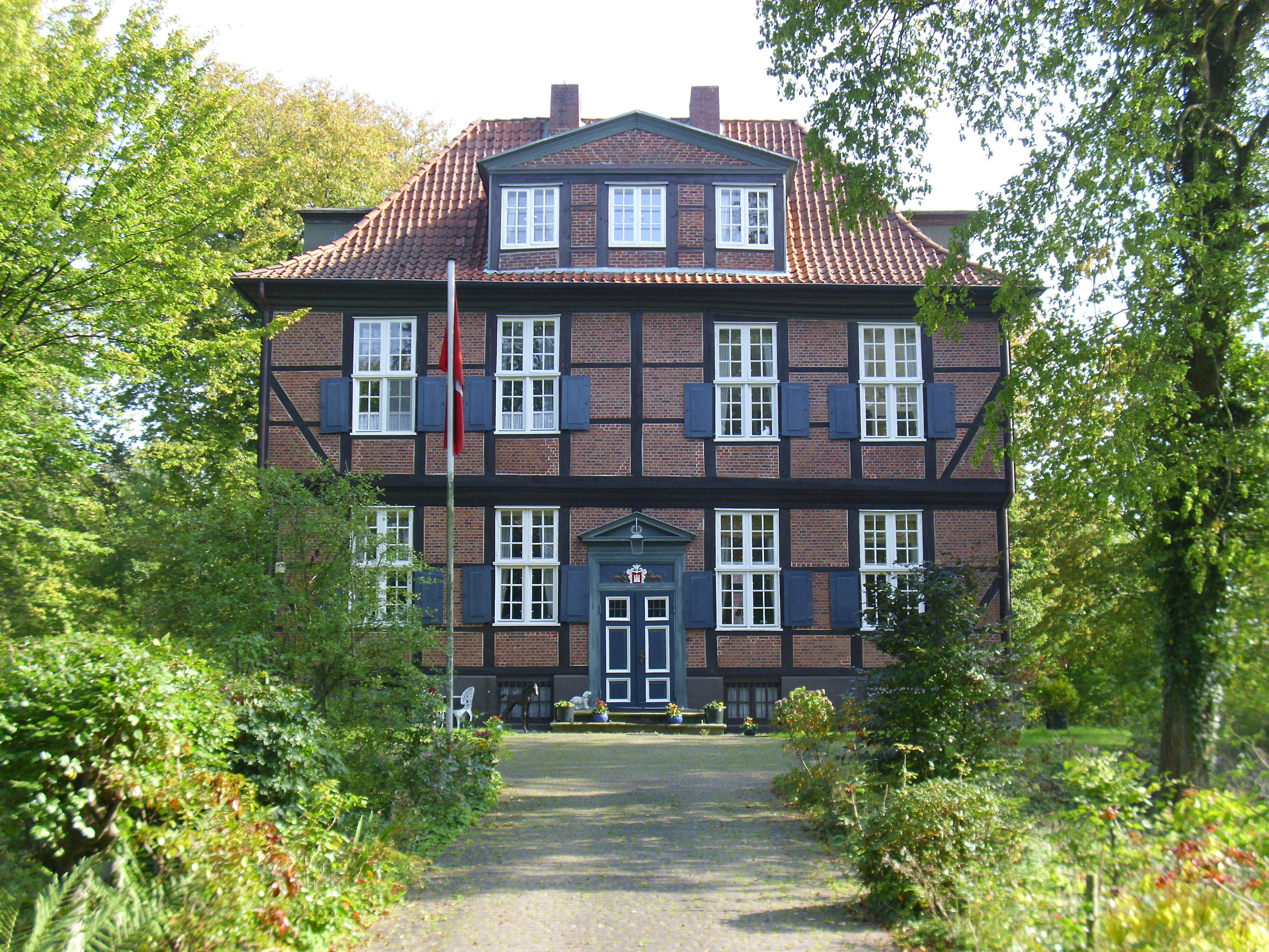 Herrenhaus Wohldorf, Herrenhausallee 4 This is a photograph of an architectural monument.